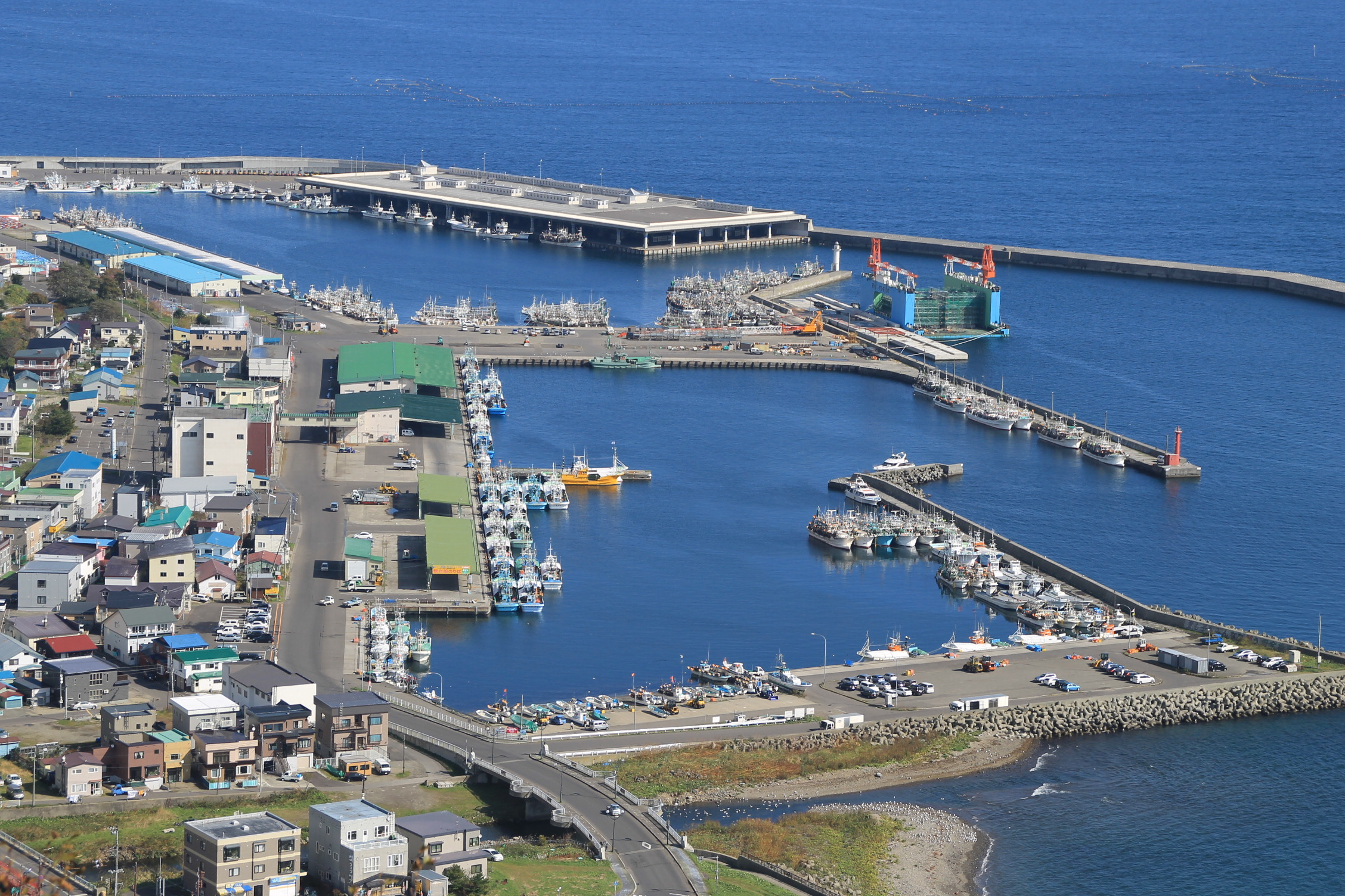 羅臼の港（Rausu Port）